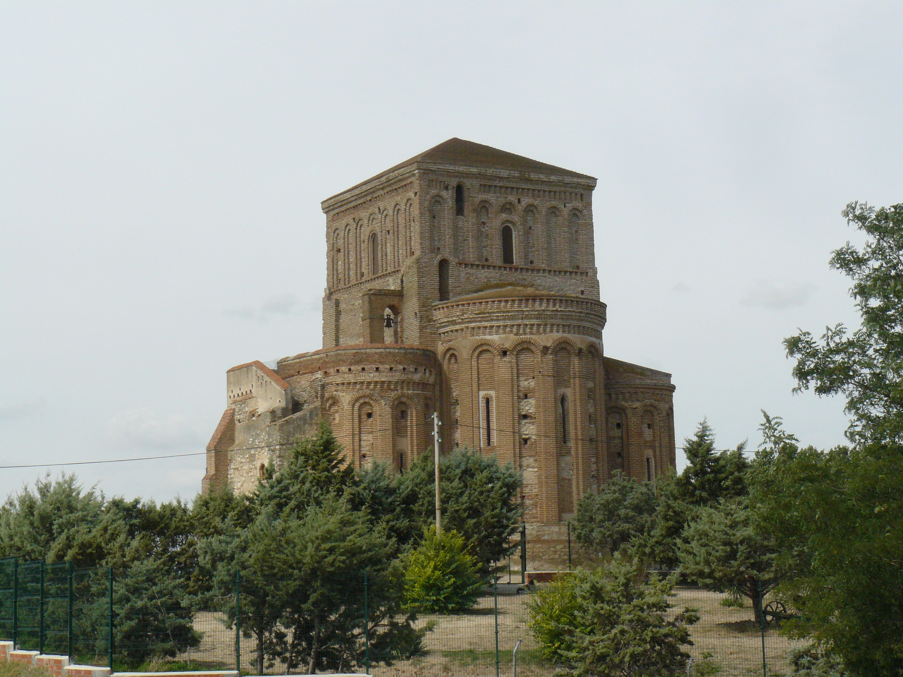 Ermita románico-mudéjar de la Lugareja, Arévalo, provincia de Ávila.